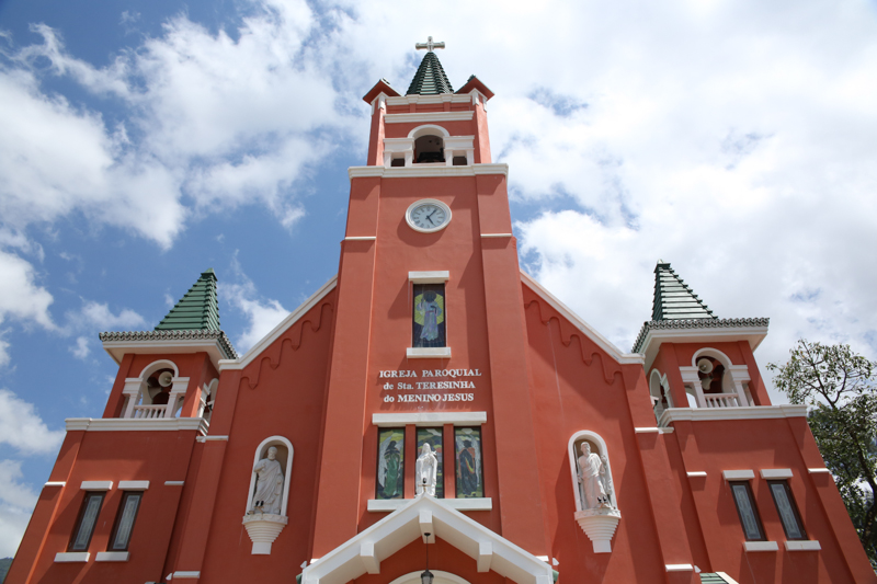 Kirche von Ossu